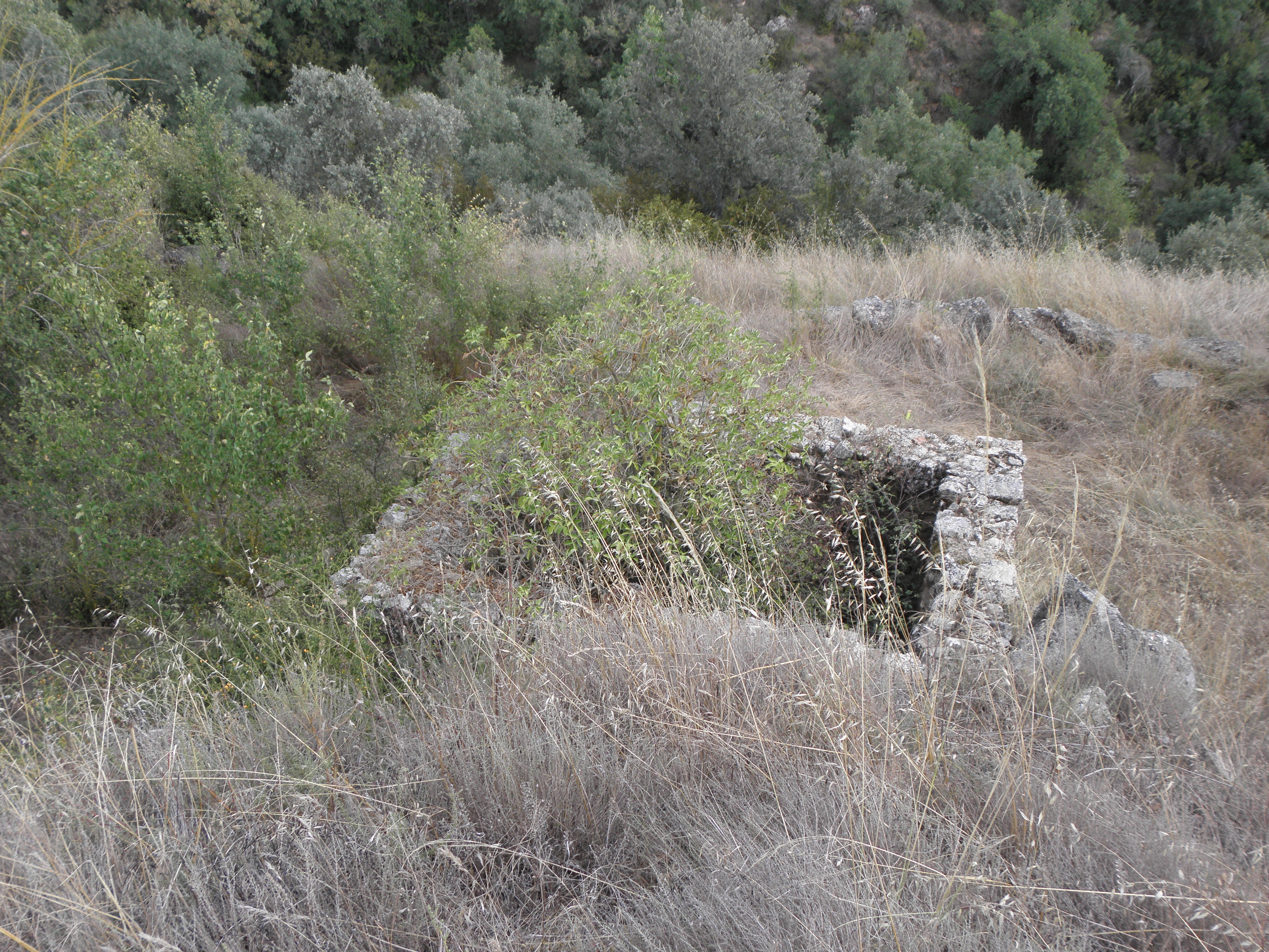 Les restes de Cal Sargantalla al peu de la torre de guaita del nucli de Sallent (Pinell de Solsonès) vistes des del peu de la torre.